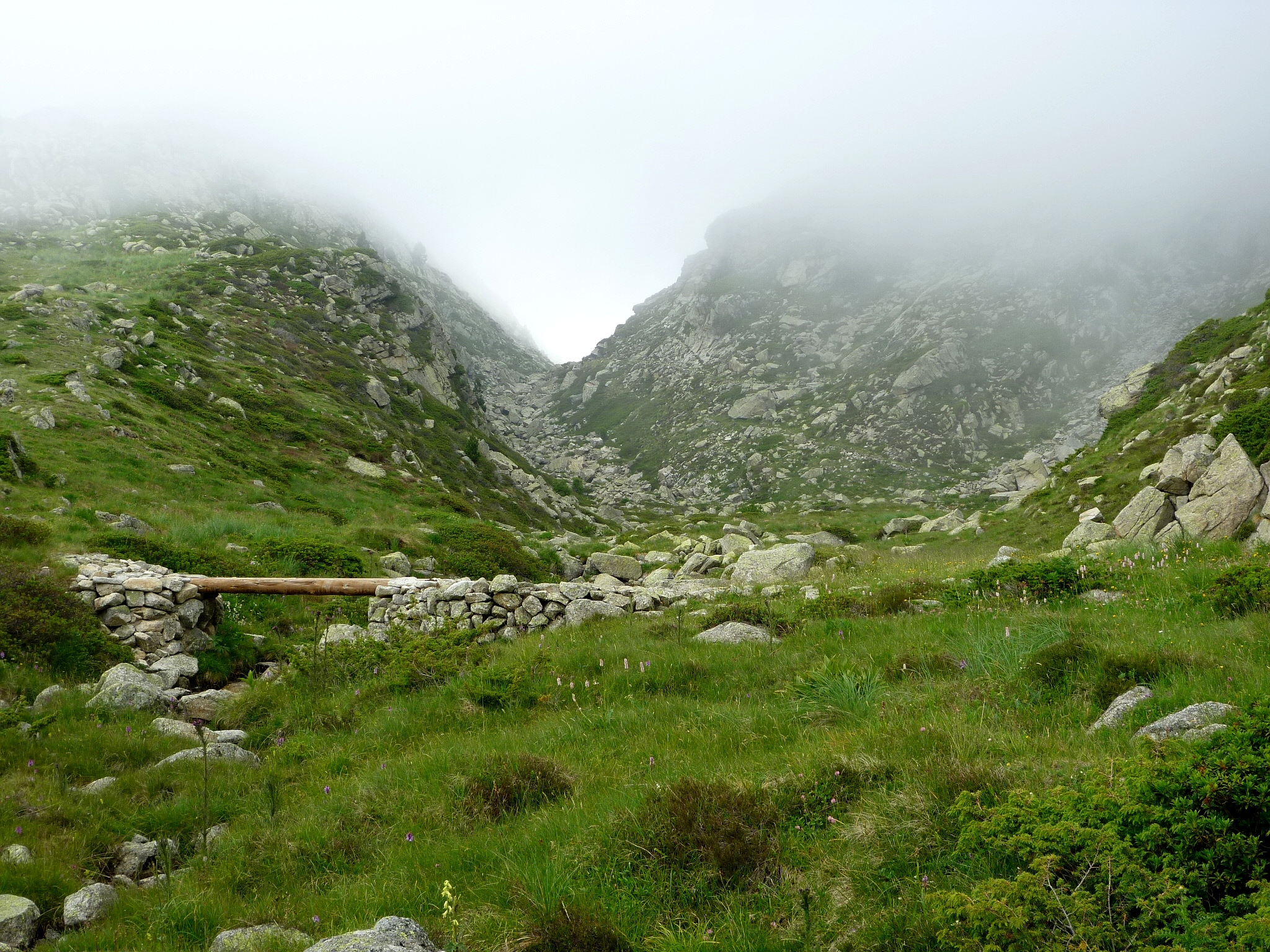 El pontet del camí de la collada de Font Sobirana creua el torrent de Sallente, en un petit replà abans d'estimbar-se a Sallente. Cabdella (Pallars Jussà - Catalunya)